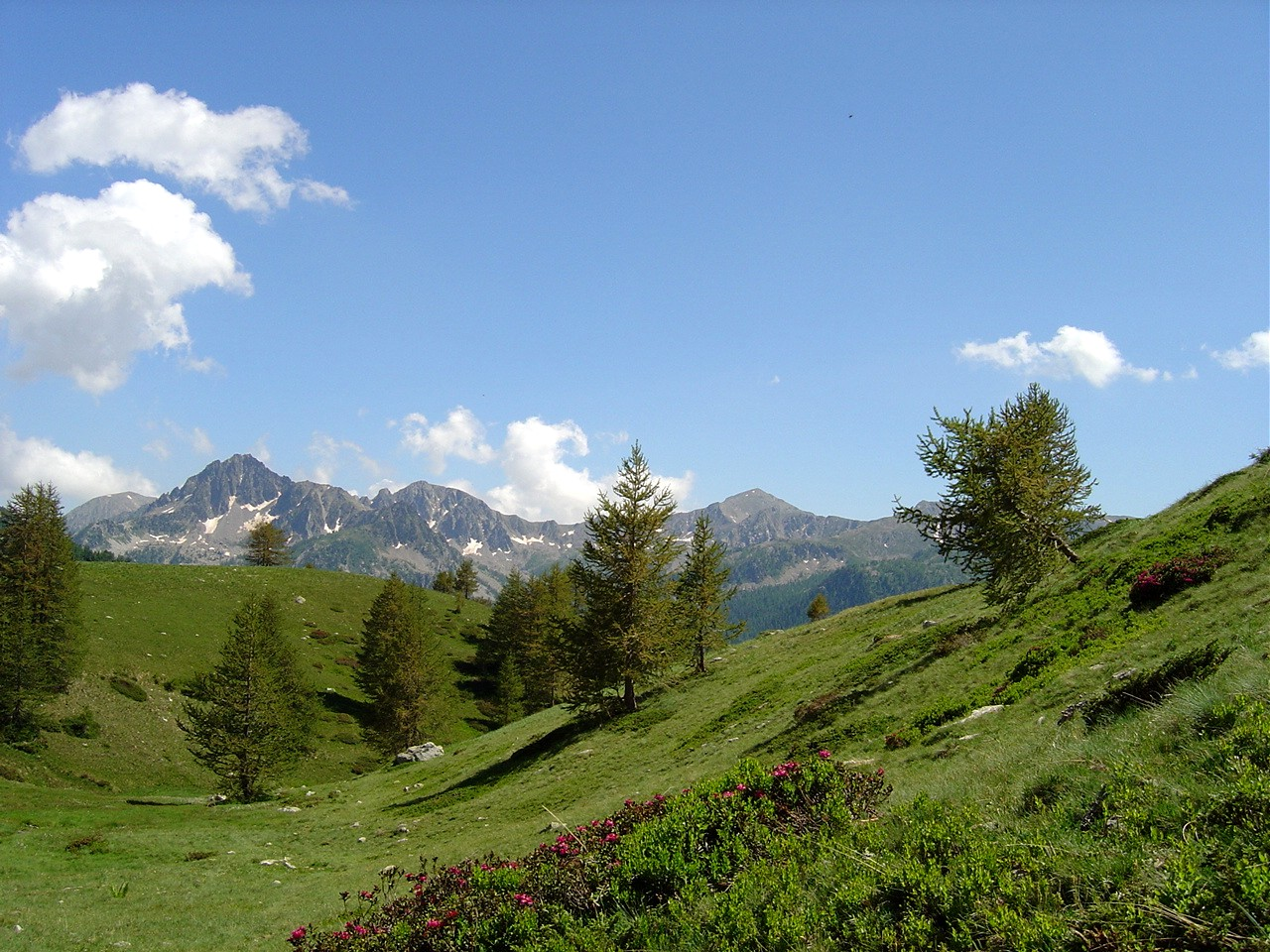 Vallon de Mollières - Parc du Mercantour - France - 2006-07-04